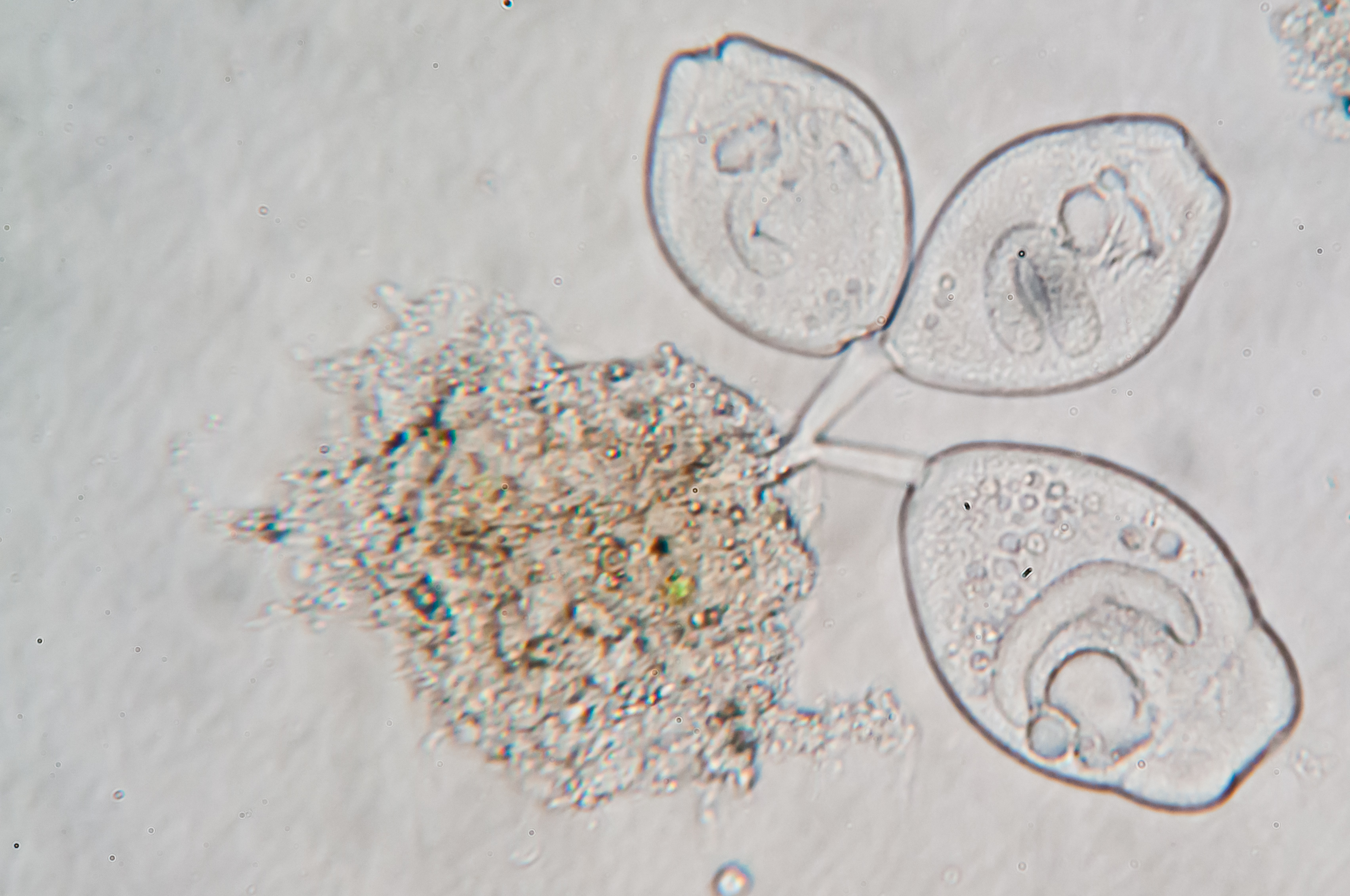 Aufnahme aus einem Licht-Mikroskop und DSLR im Rahmen einer Abwasseruntersuchung.